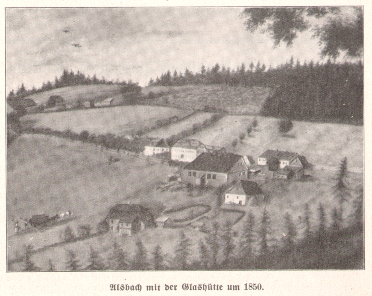 Der Ort Alsbach im Thüringer Wald mit der Glashütte in Bildmitte, im Original colorierte Fassung